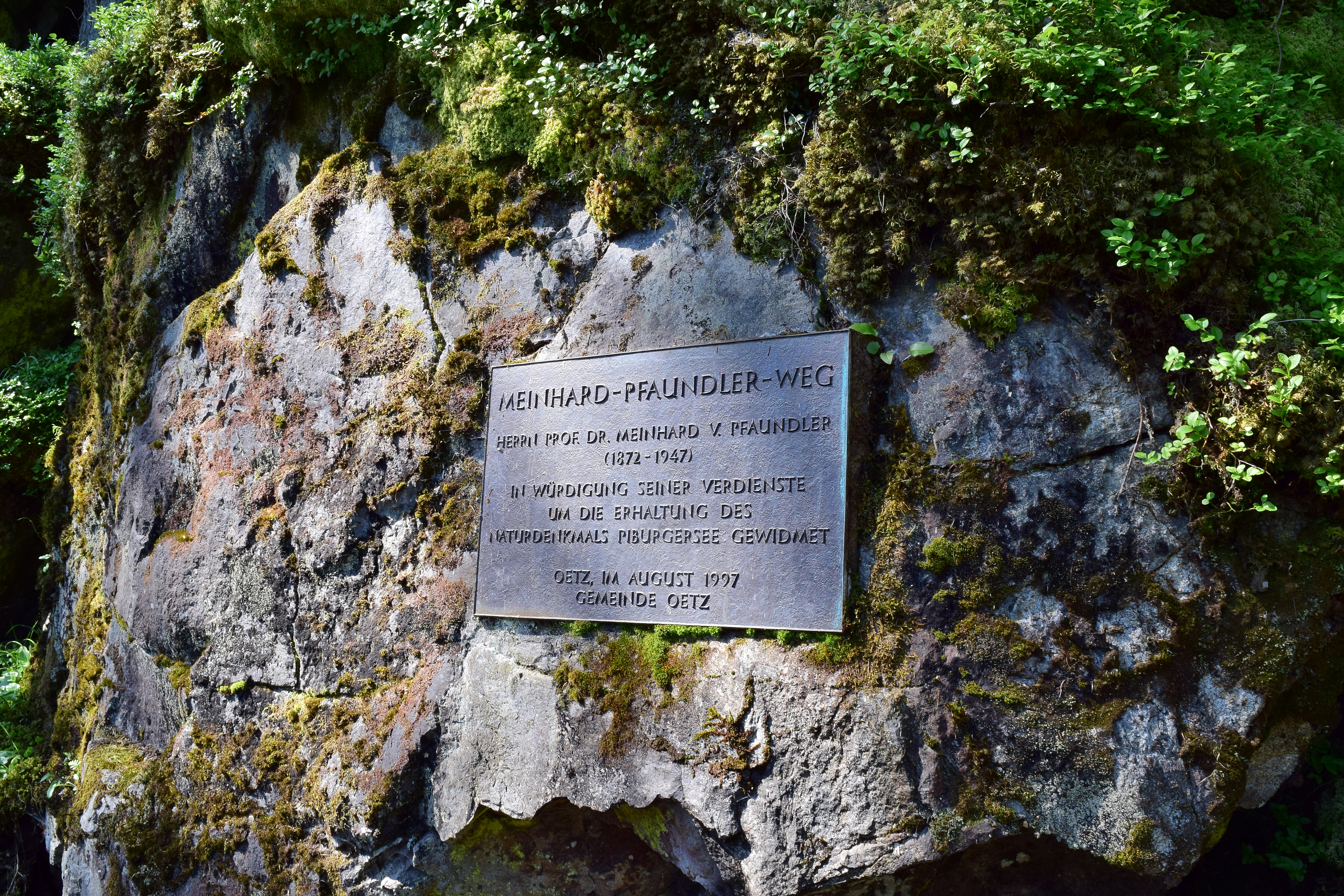 Das Landschaftsschutzgebiet Achstürze-Piburger See ist Teil des Naturparks Ötztal, der Piburger See selbst ist ein Naturdenkmal. Gedenktafel für Meinhard Pfaundler. This media shows the natural monument in the Tyrol with the ID ND_2_2. This file shows the Nature Park with the ID 7122 in Austria.